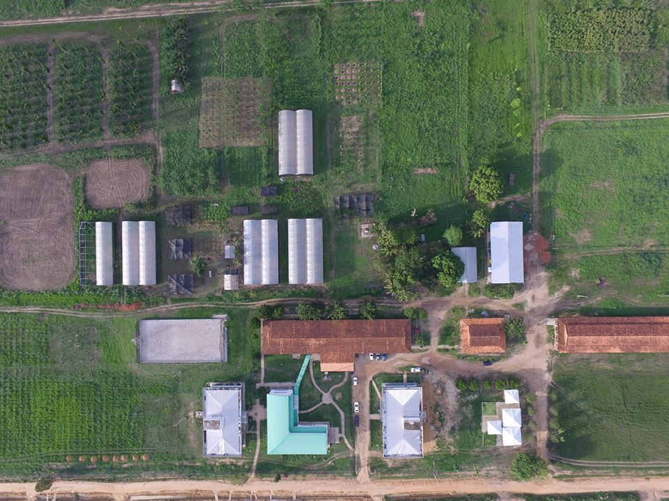 Imagem aerea da UFRA campus Capitão Poço